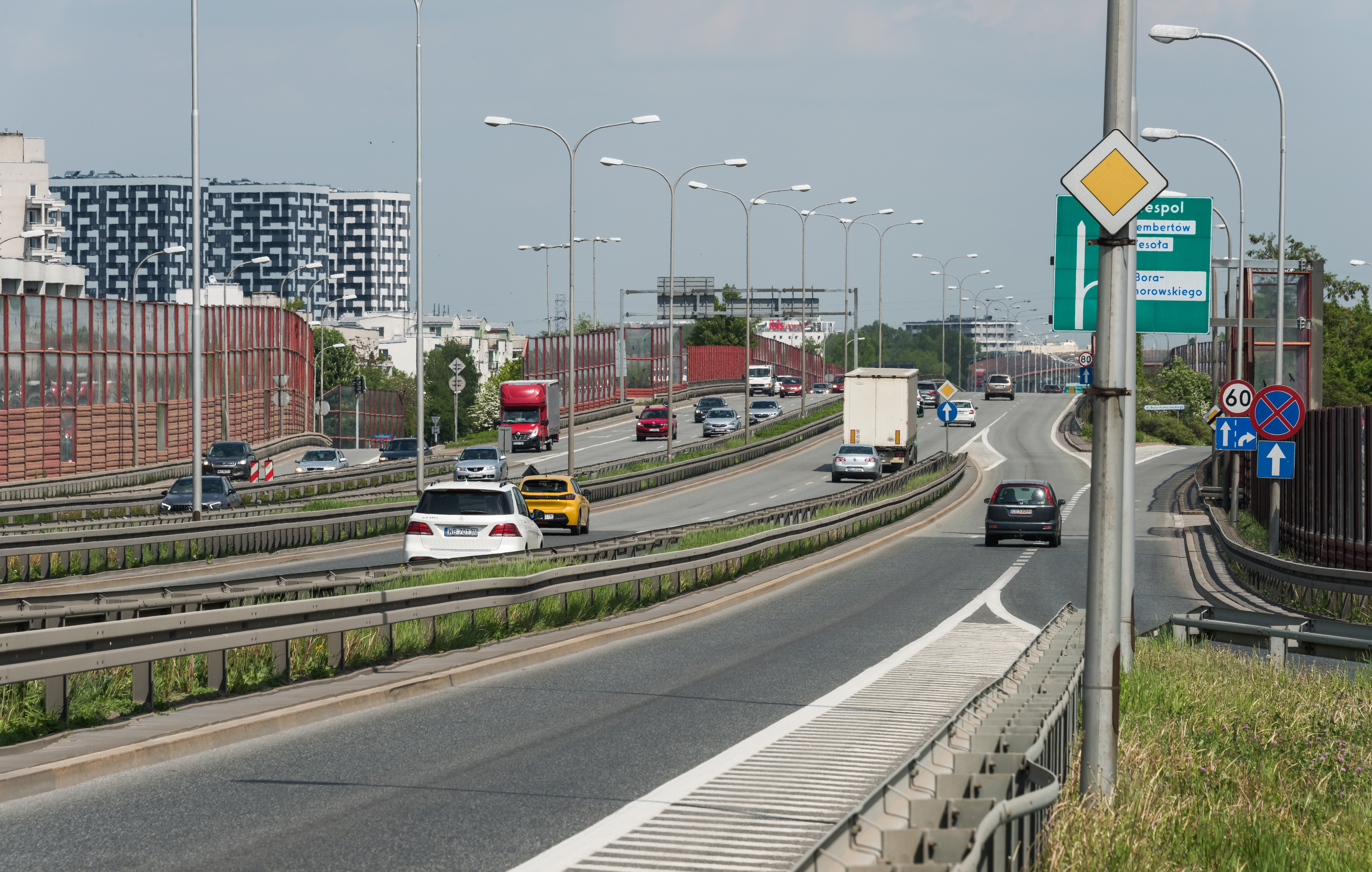 Trasa Siekierkowska na wysokości ul. Kosmatki w Warszawie